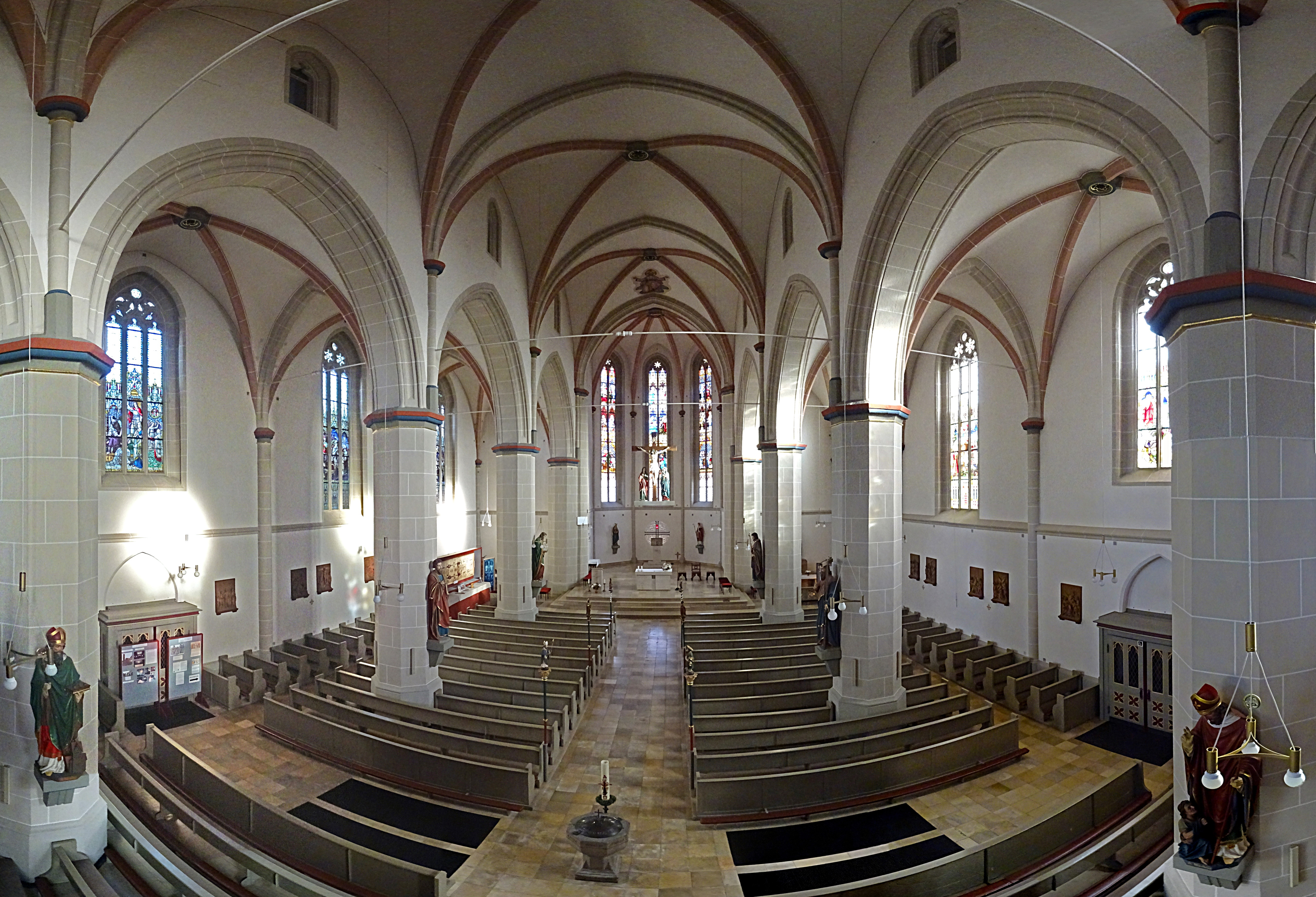 Innenraum Panorama der Pfarrkirche St. Gertrud (Dingelstädt)